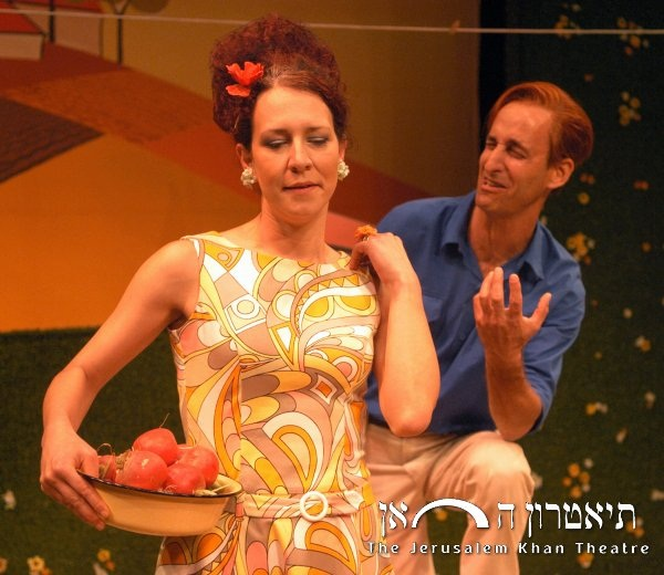 לוקס הפחדן צלם-ז'רר אלון